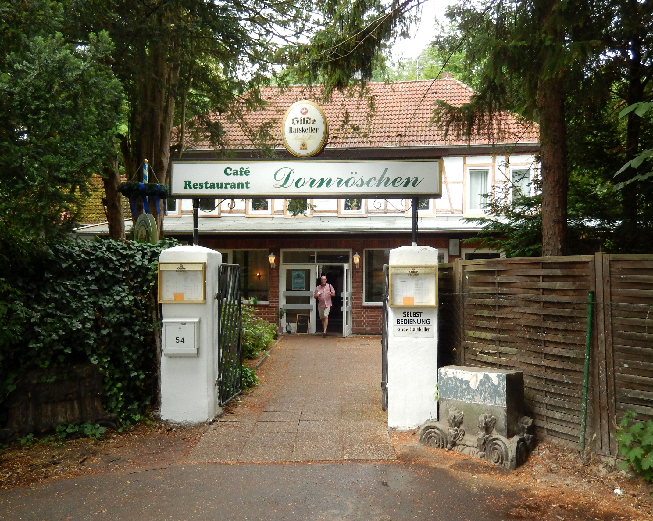 Eingang Dornröschen in Hannover